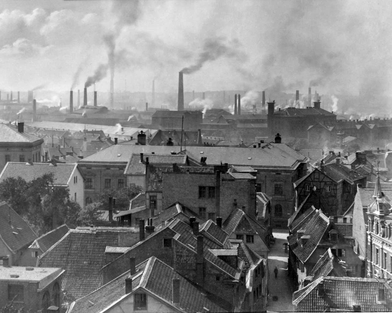 Essen, Stadtpanorama vom Rathausturm nach Westen, Krupp Fabriken, um 1890